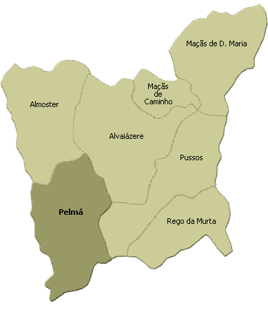 localisation de pelma sur la freguesia de alvaiazere